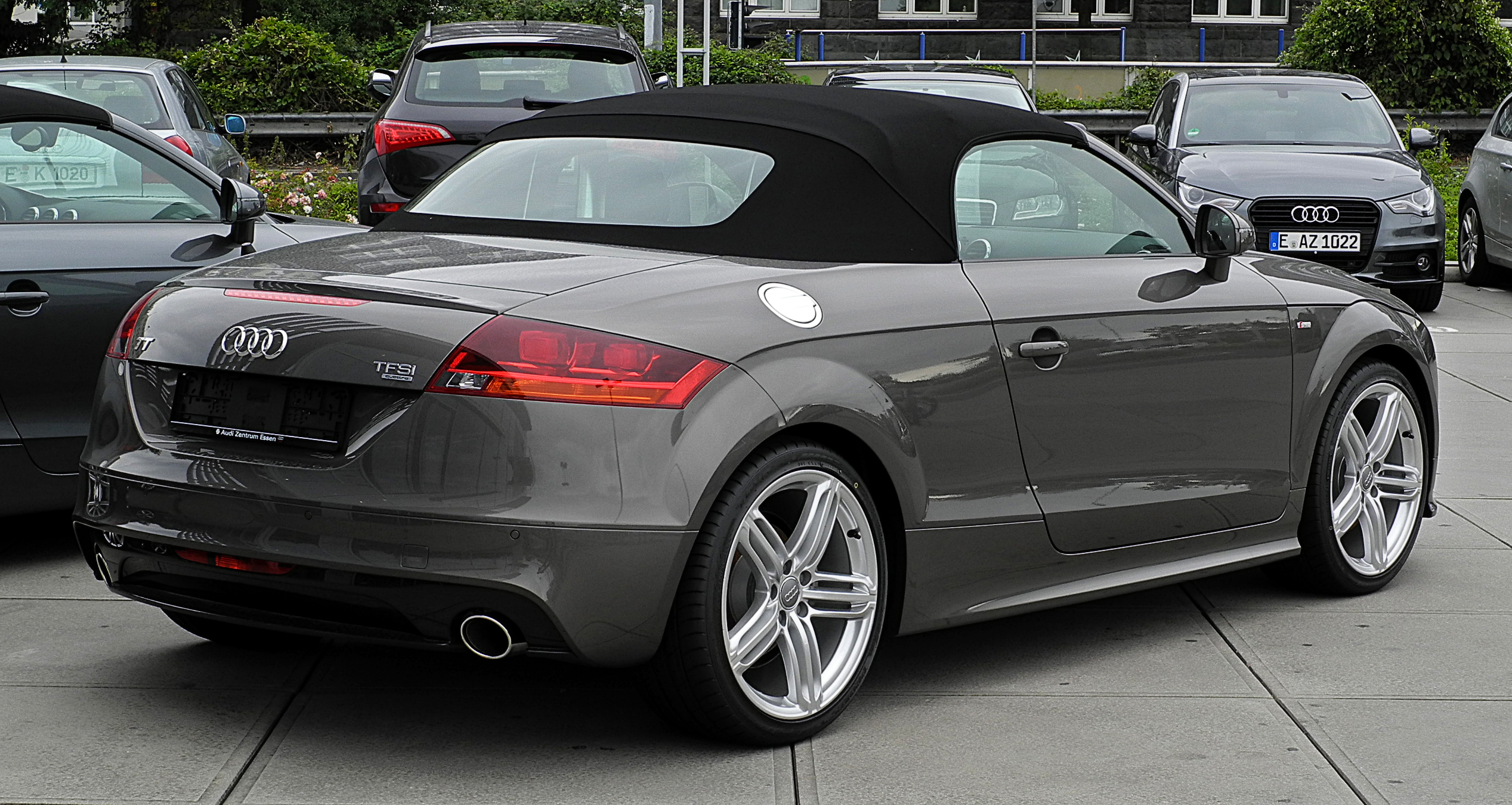 Audi TT Roadster 2.0 TFSI quattro S-line (8J, Facelift)